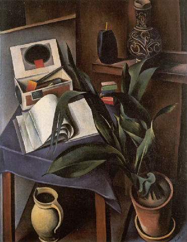 Still Life II